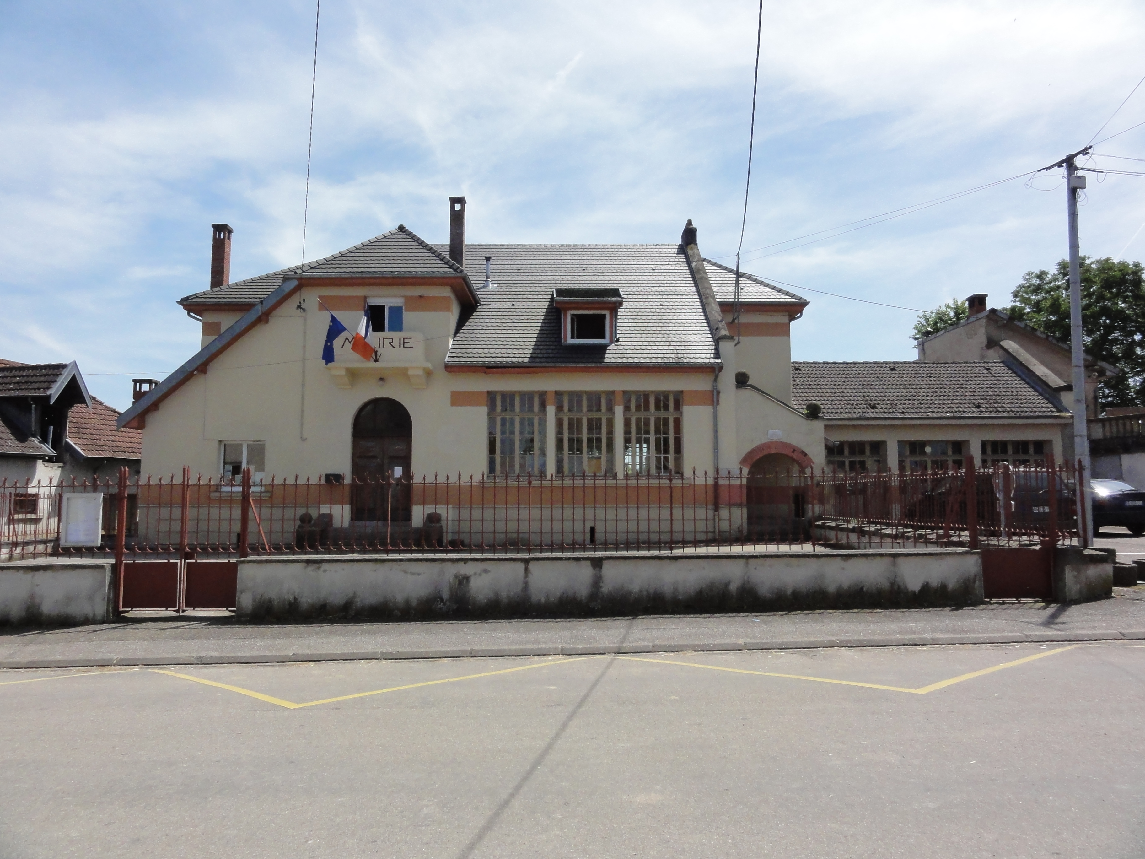 Mignéville (M-et-M) mairie - école